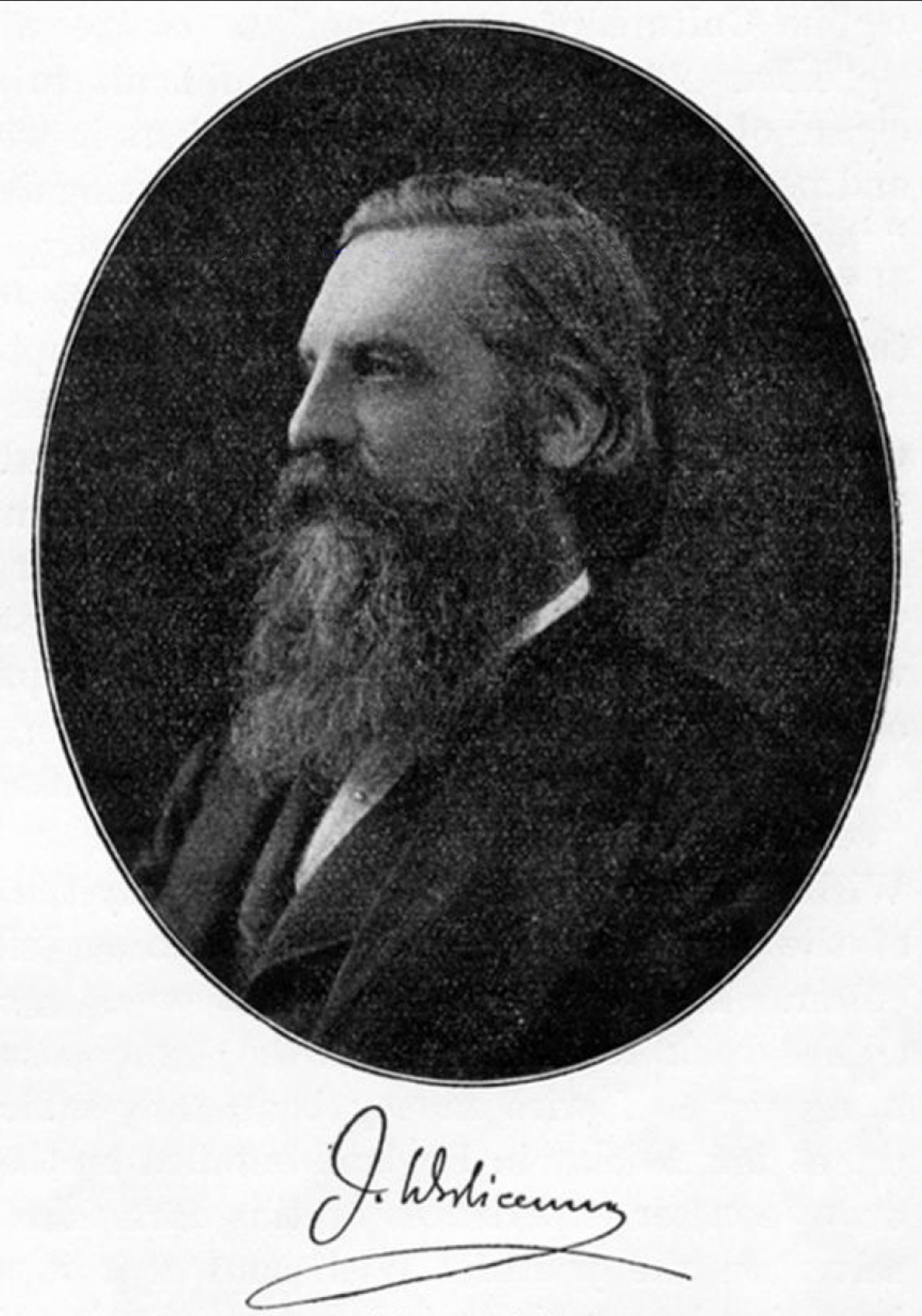 Picture of Johannes Adolf Wislicenus (* 24. Juni 1835 in Kleineichstädt; † 5. Dezember 1902 in Leipzig)